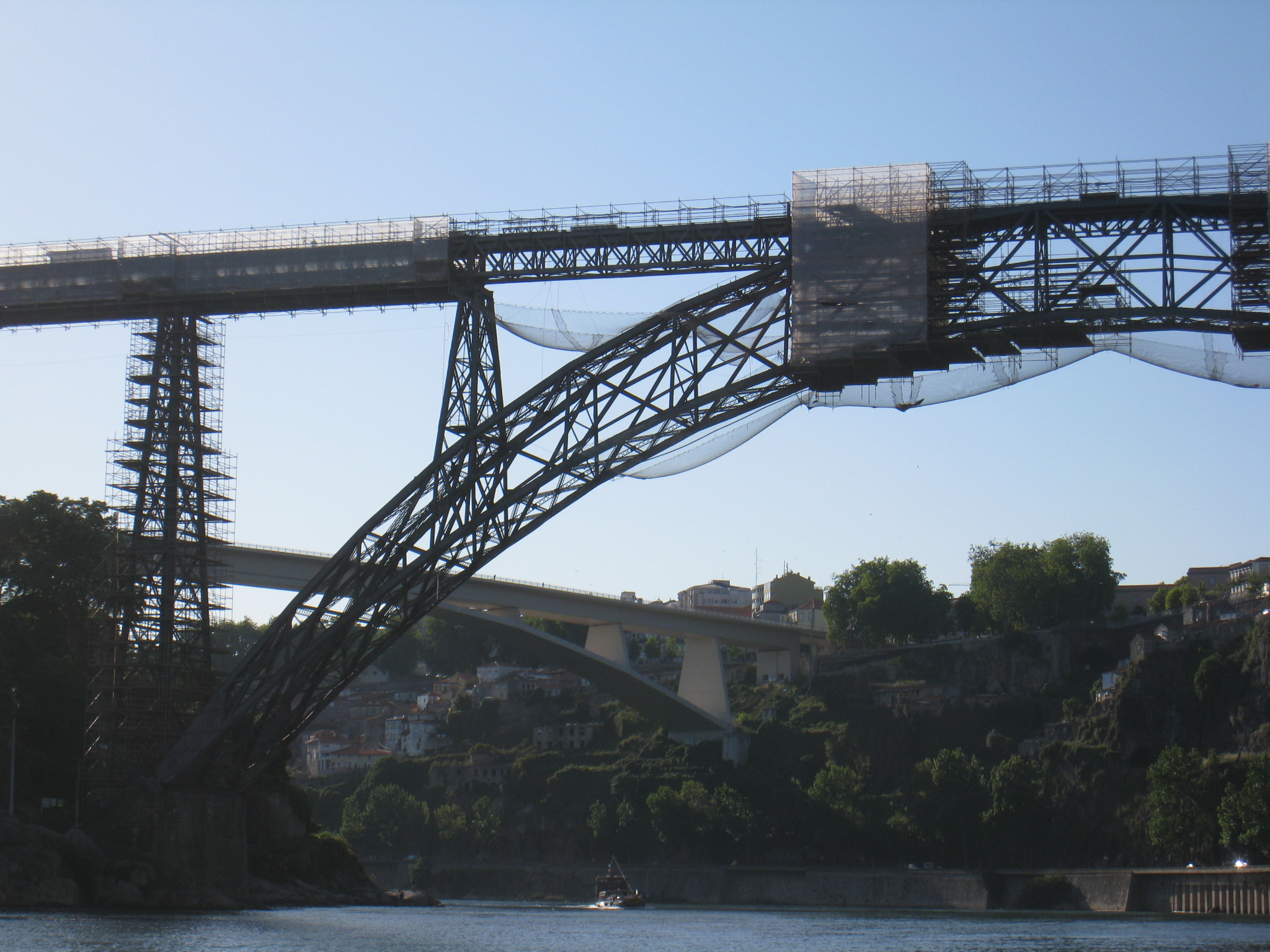 0161 May 27, 2009